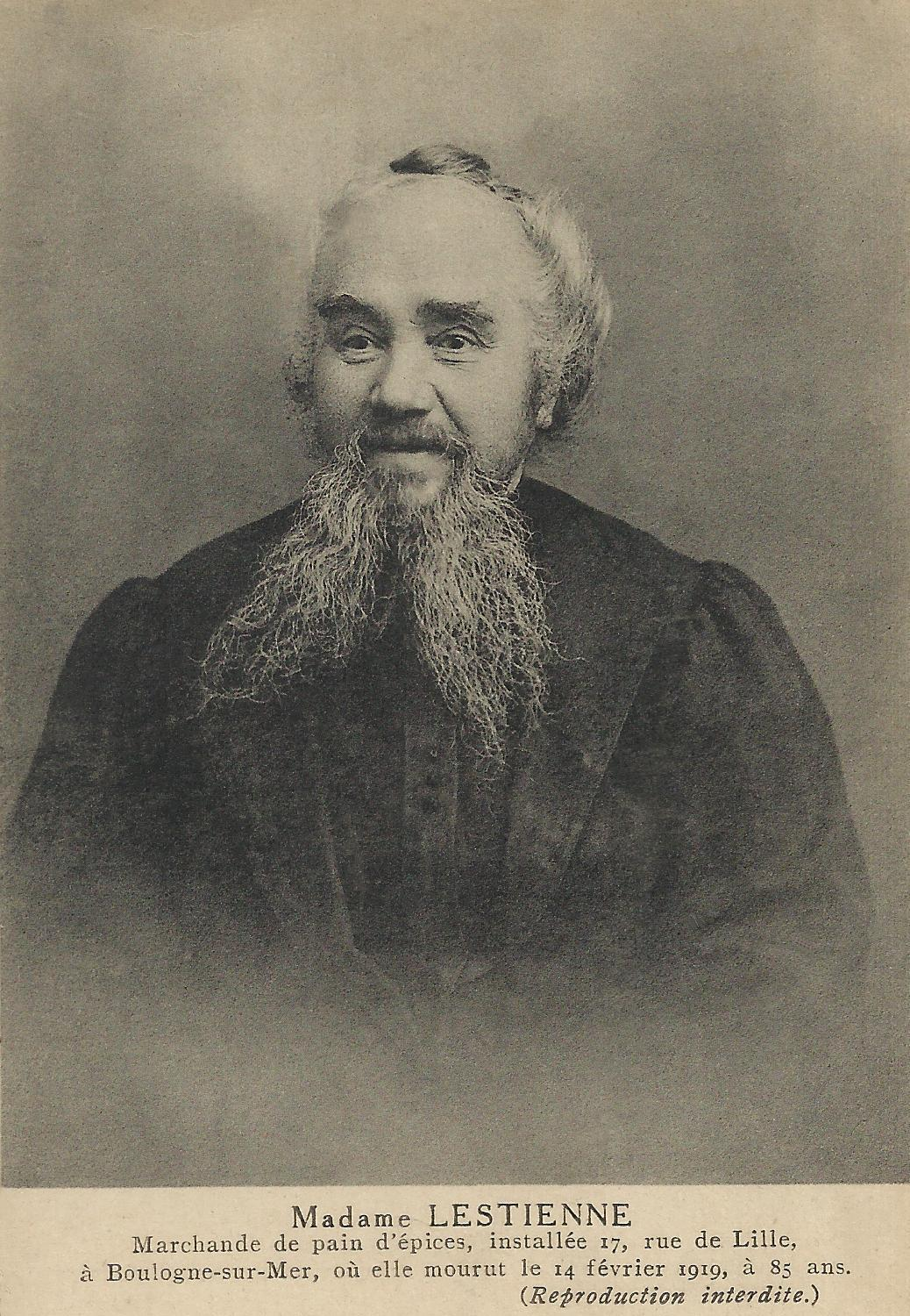 Marchande de pain d'épices, installés 17 rue de Lille à Boulogne sur Mer ou elle mourut le 14 février 1919